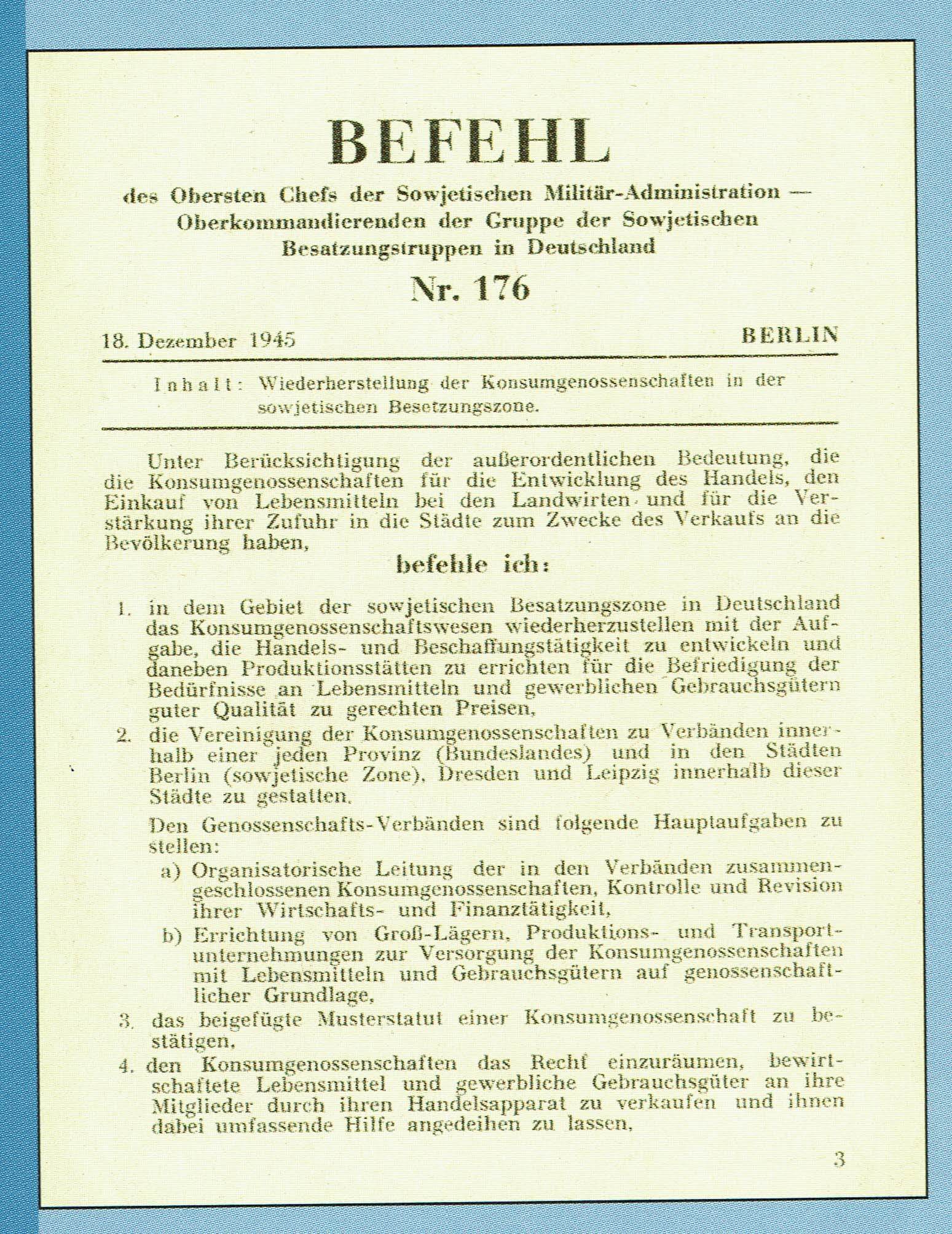 Befehl 176 der SMAD zur Wiederherstellung der Konsumgenossenschaften